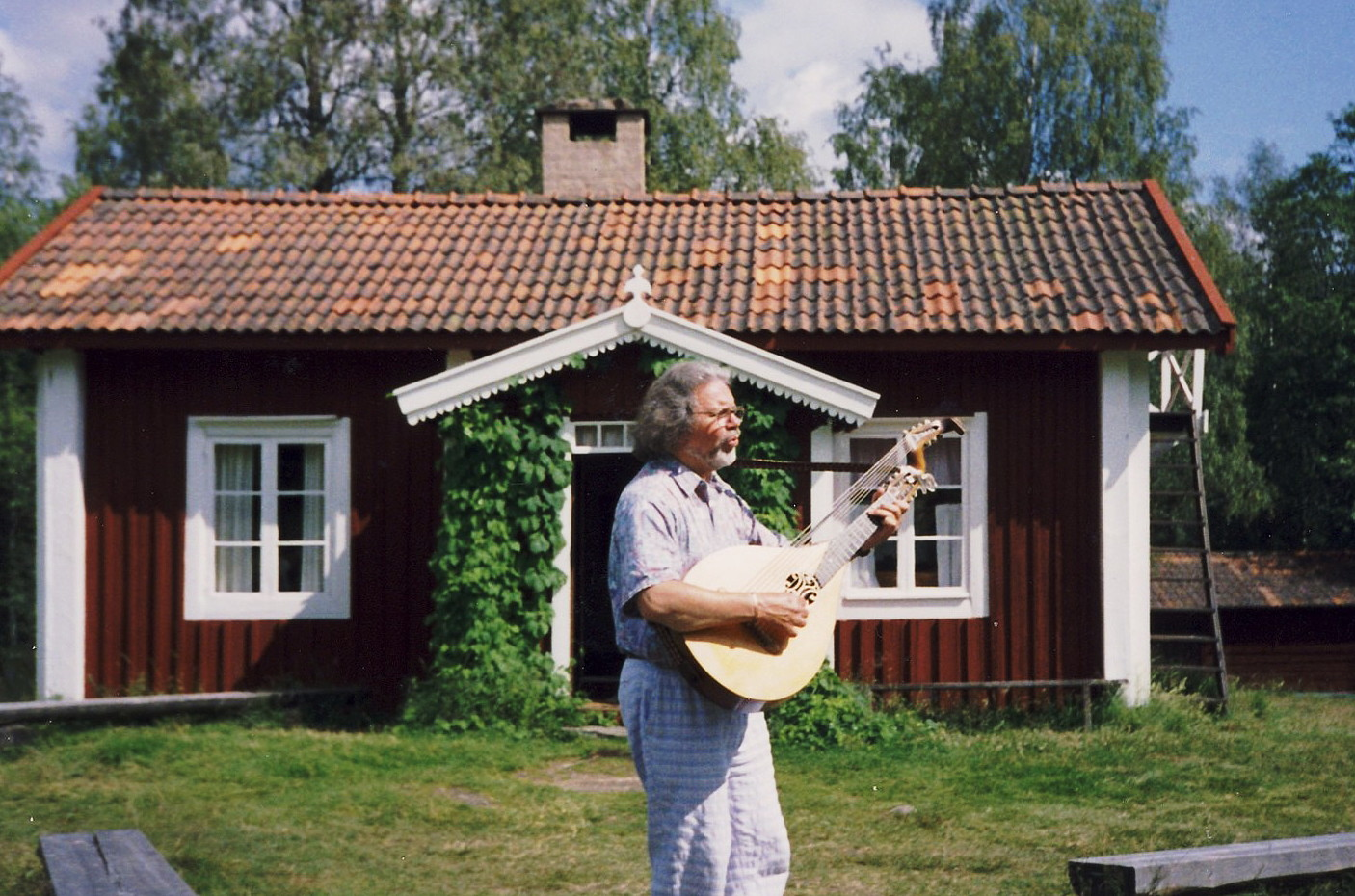 Nisse Munck utanför Luossastugan, Skattlösberg, Dalarna